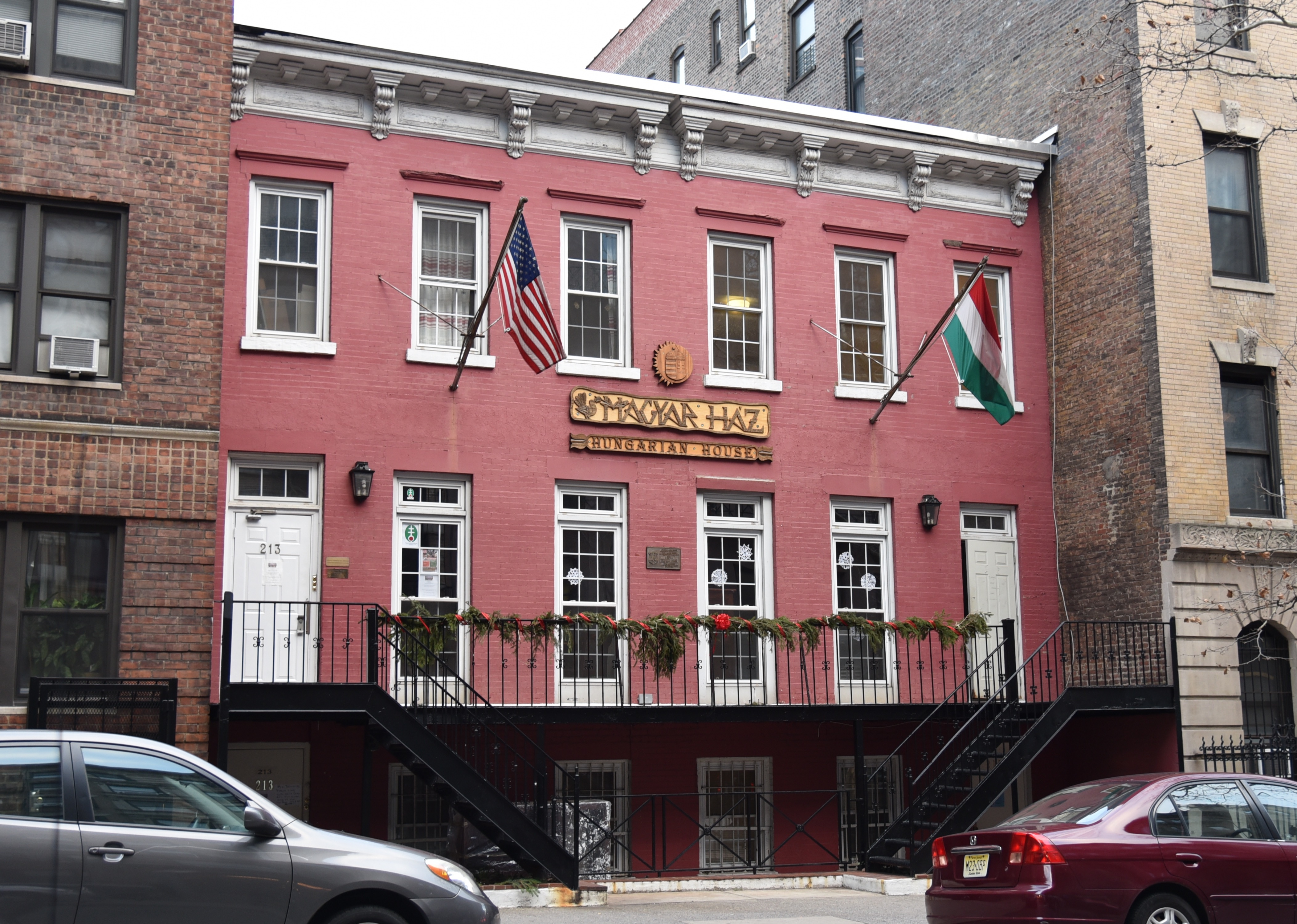 A New York-i Magyar Ház épülete a 82. utcában